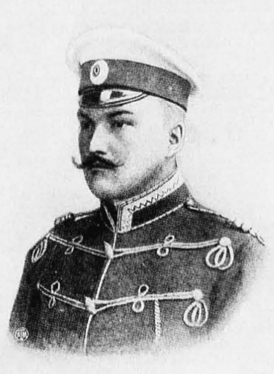 Скалон, Георгий Николаевич (1876—?) — полковник императорской армии.